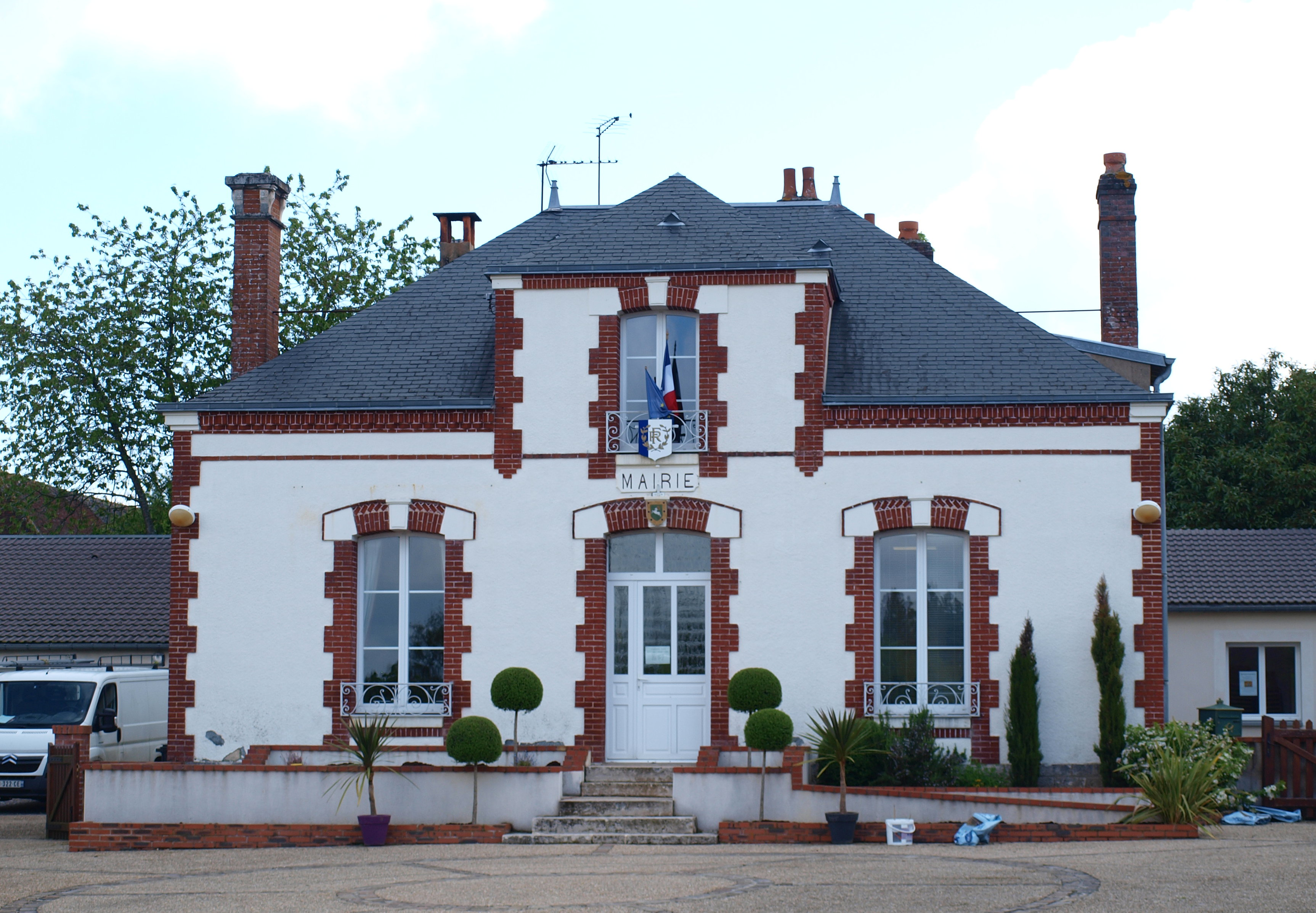 Boismorand (Loiret, France)